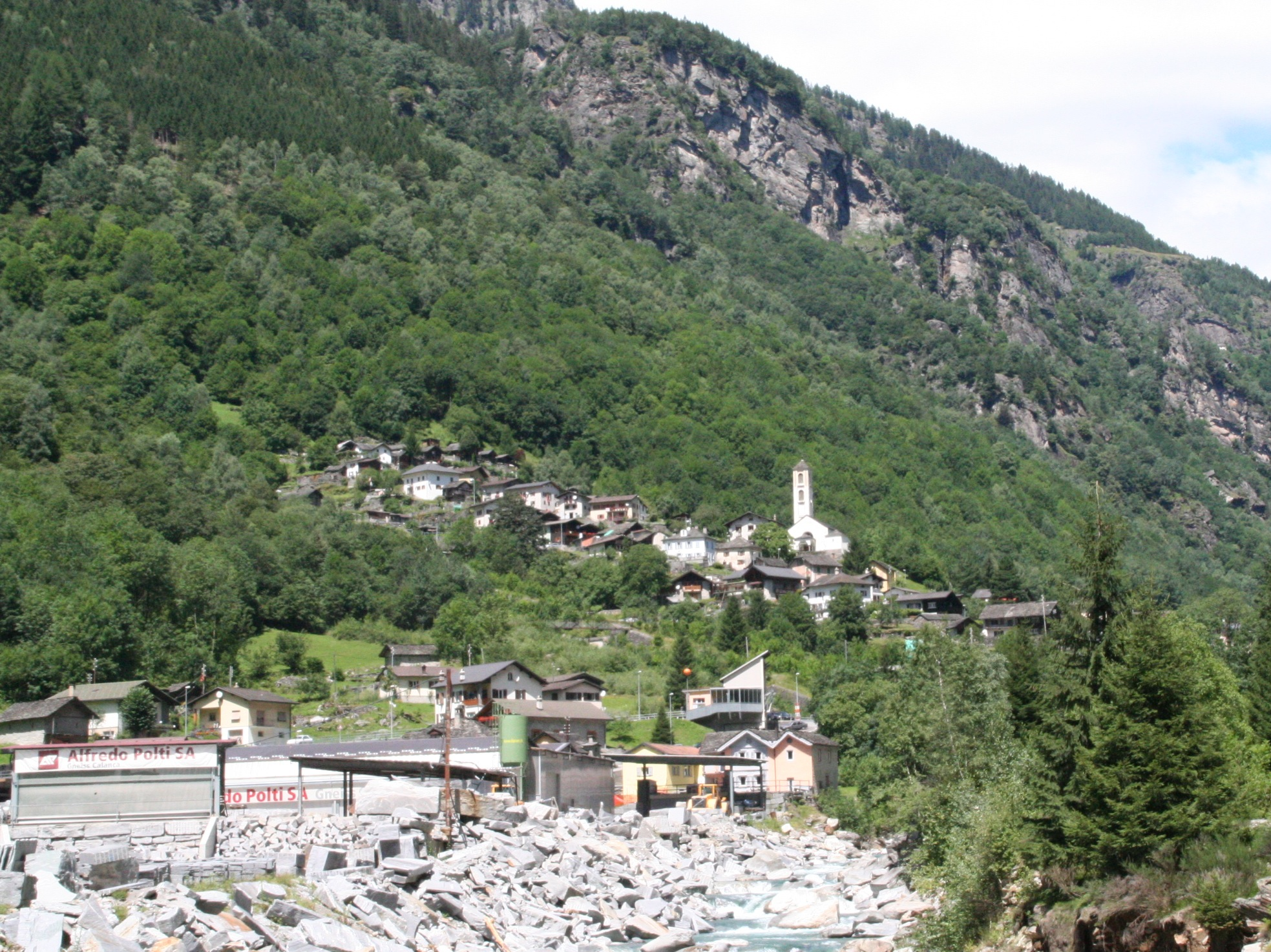 Arvigo